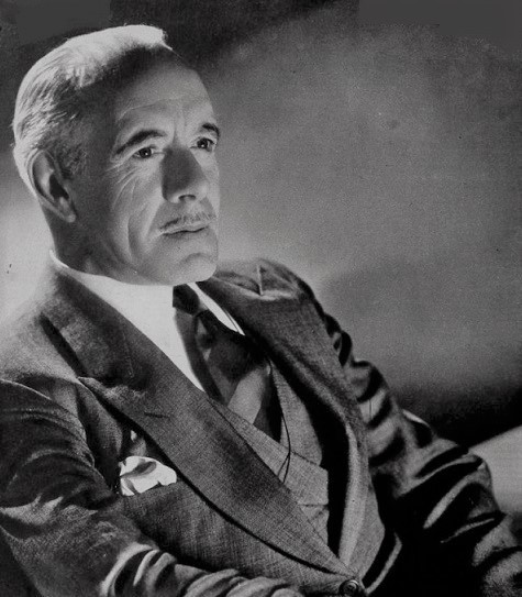 Lewis Stone